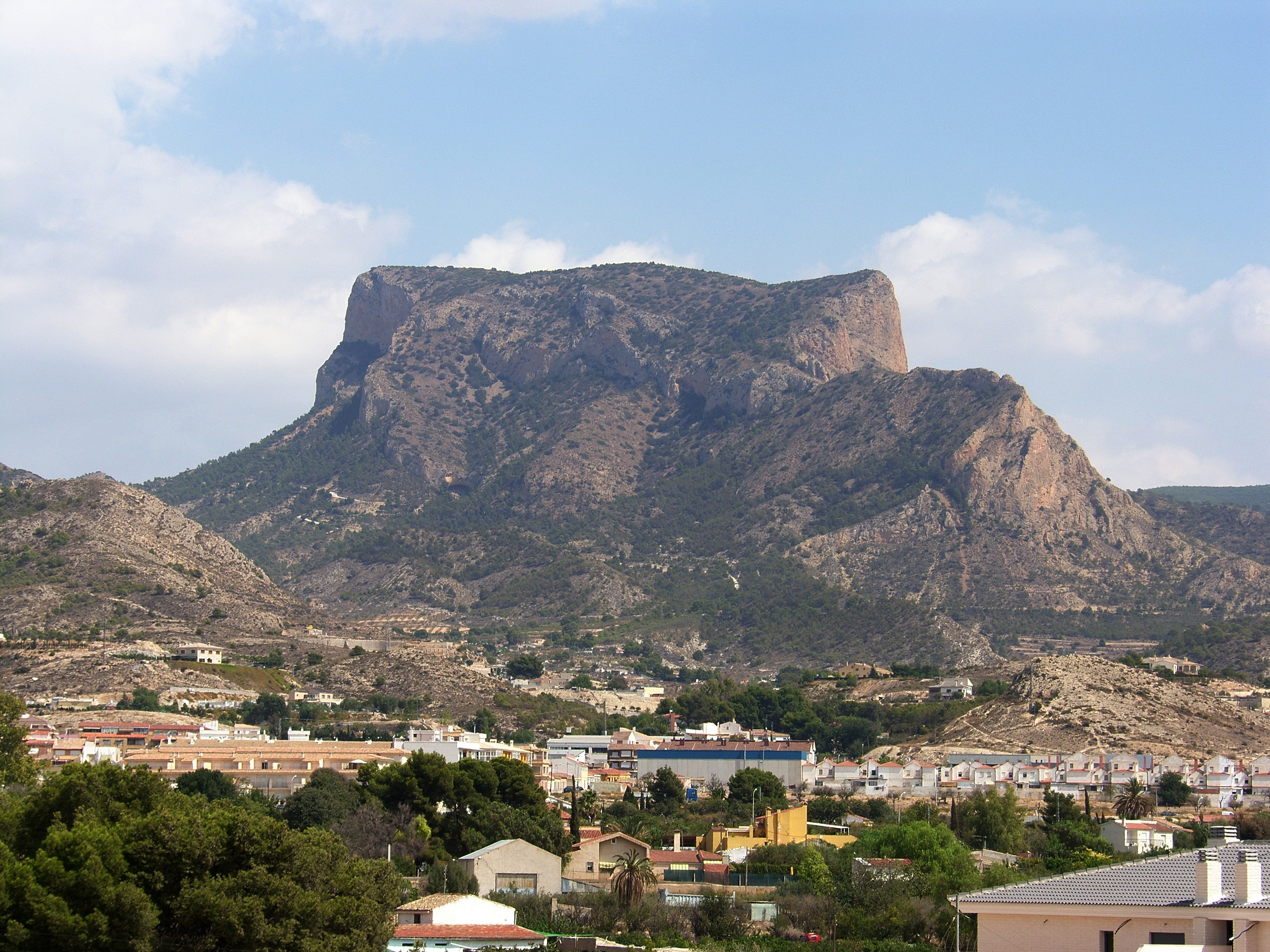 Porción de una fotografía de la Silla del Cid, Petrer, Vinalopó Medio, Alicante, España.